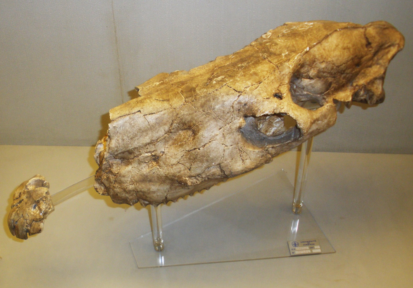 Fossil of Hipparion, an extinct mammal- Took the picture at Museo di Paleontologia di Firenze